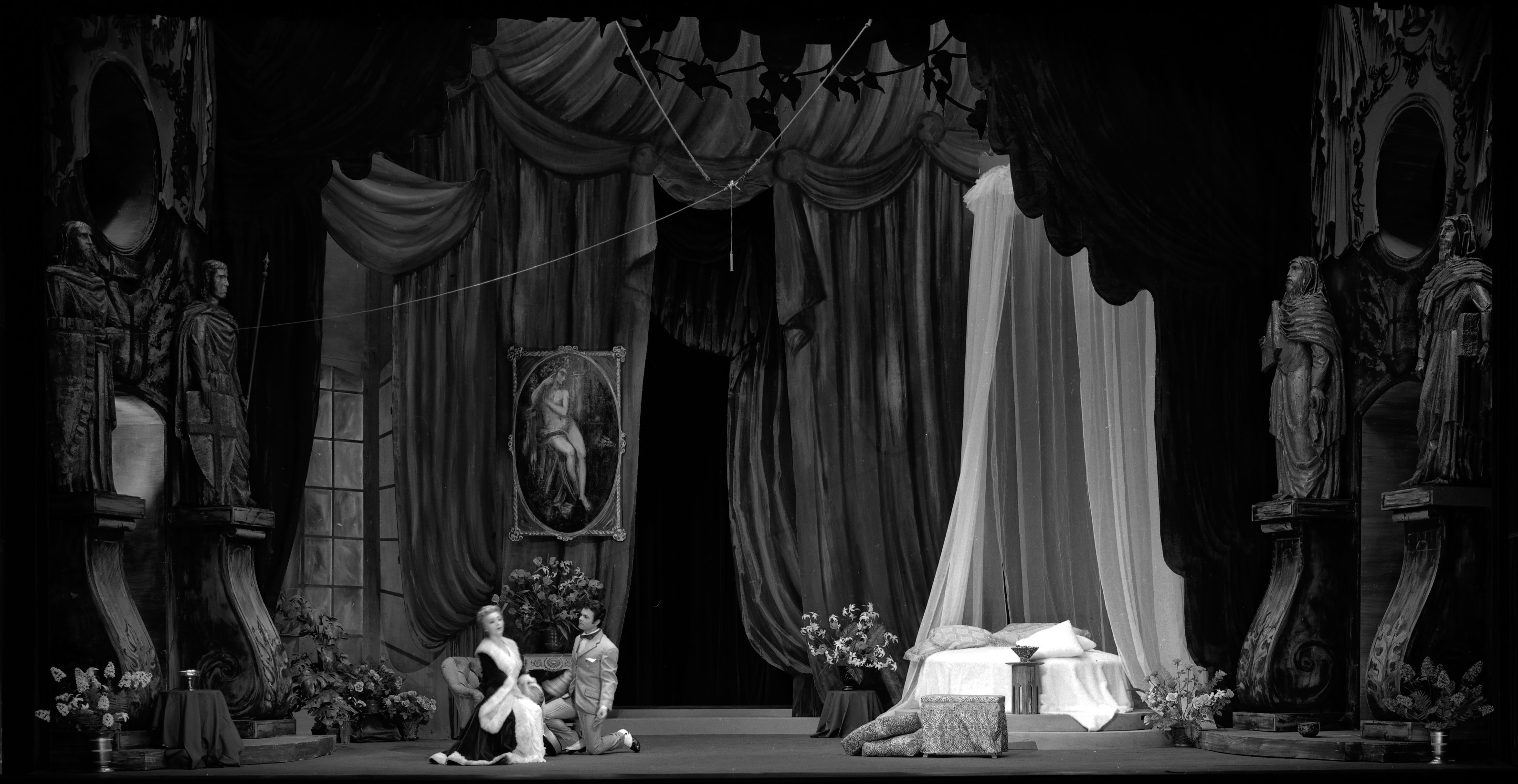 Théâtre du Capitole. Le 8 Novembre 1967. Vue de la représentation de Koeningsmark au théâtre du Capitole.